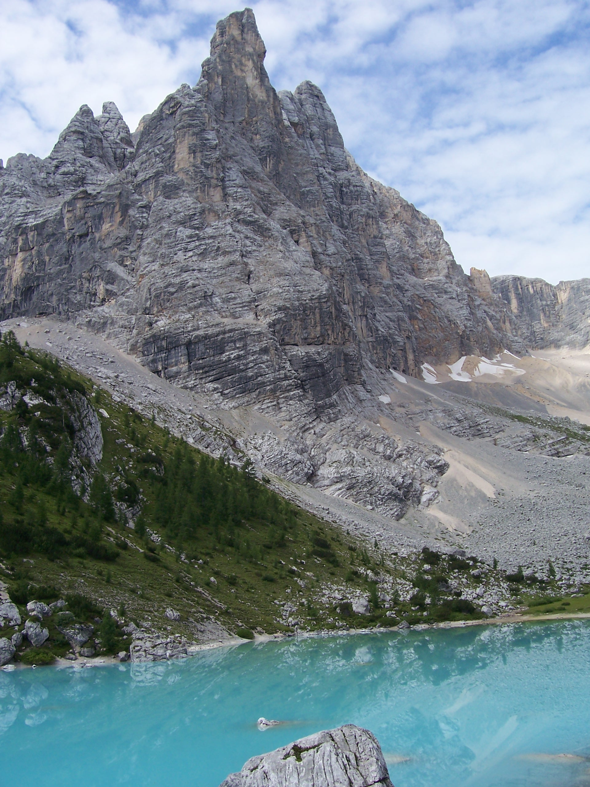 Laghetto del Sorapis e Dito di Dio